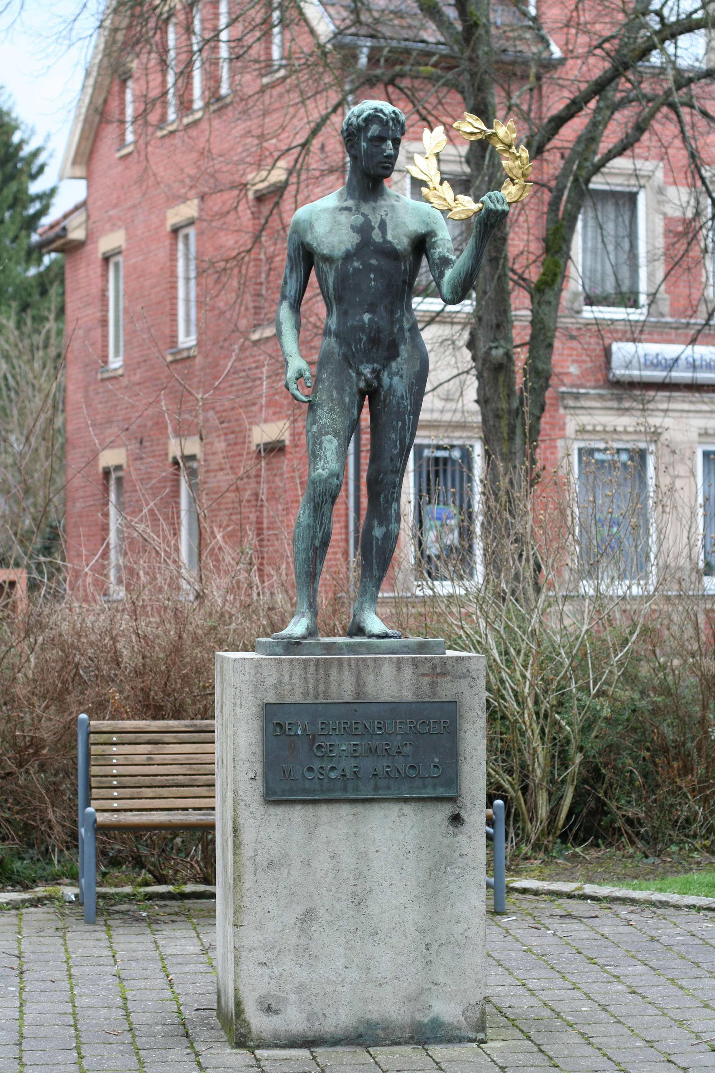 Denkmal für Max Oscar Arnold auf dem Arnoldplatz in Neustadt bei Coburg